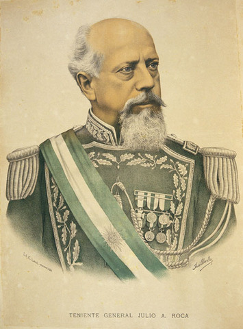 Retrato oficial de Julio Argentino Roca, presidente argentino entre 1880-1886 y 1898-1904.